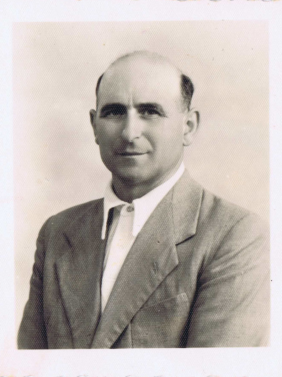 Ritratto di Giuseppe Pieretti, fondatore dell'industria cartaria Pieretti.